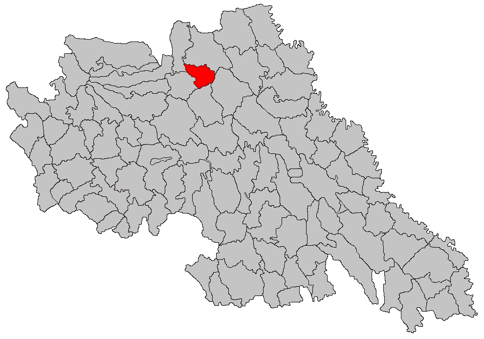 Categorie:Hărţi ale judeţului Iaşi